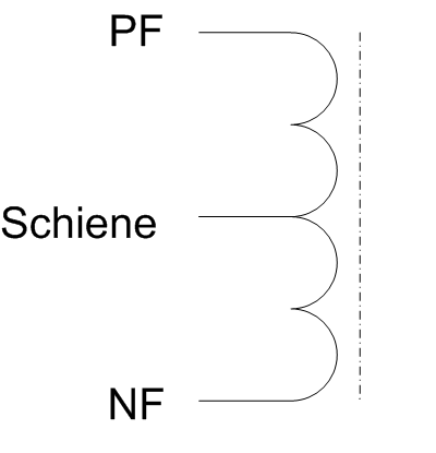 Aufbauprinzip eines Autotrafo